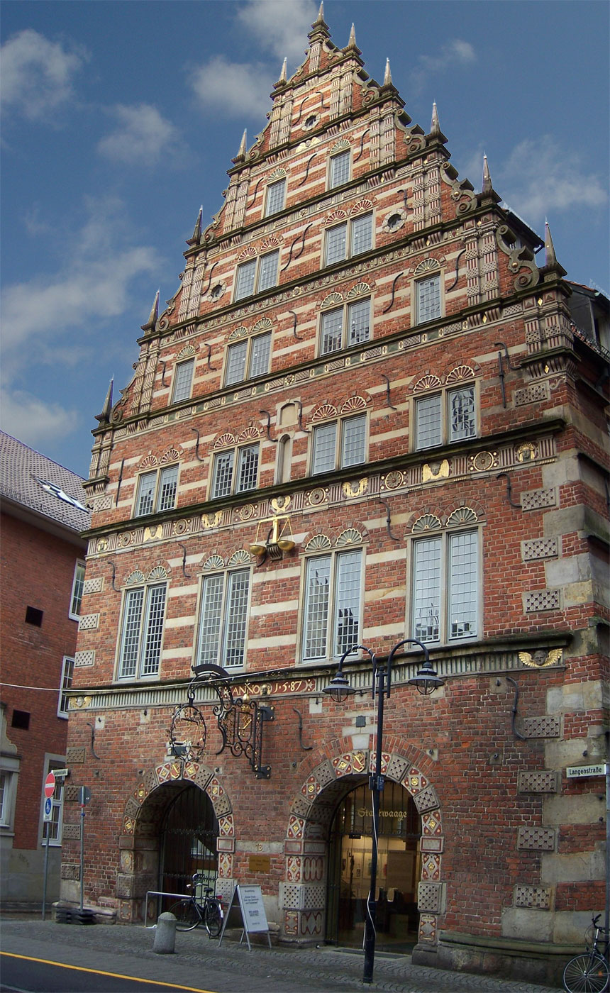 Bremen. Die Stadtwaage Das abgebildete Objekt ist ein geschütztes Kulturdenkmal in der Freien Hansestadt Bremen, mit der Nr. 0831,T beim Landesamt für Denkmalpflege registriert.